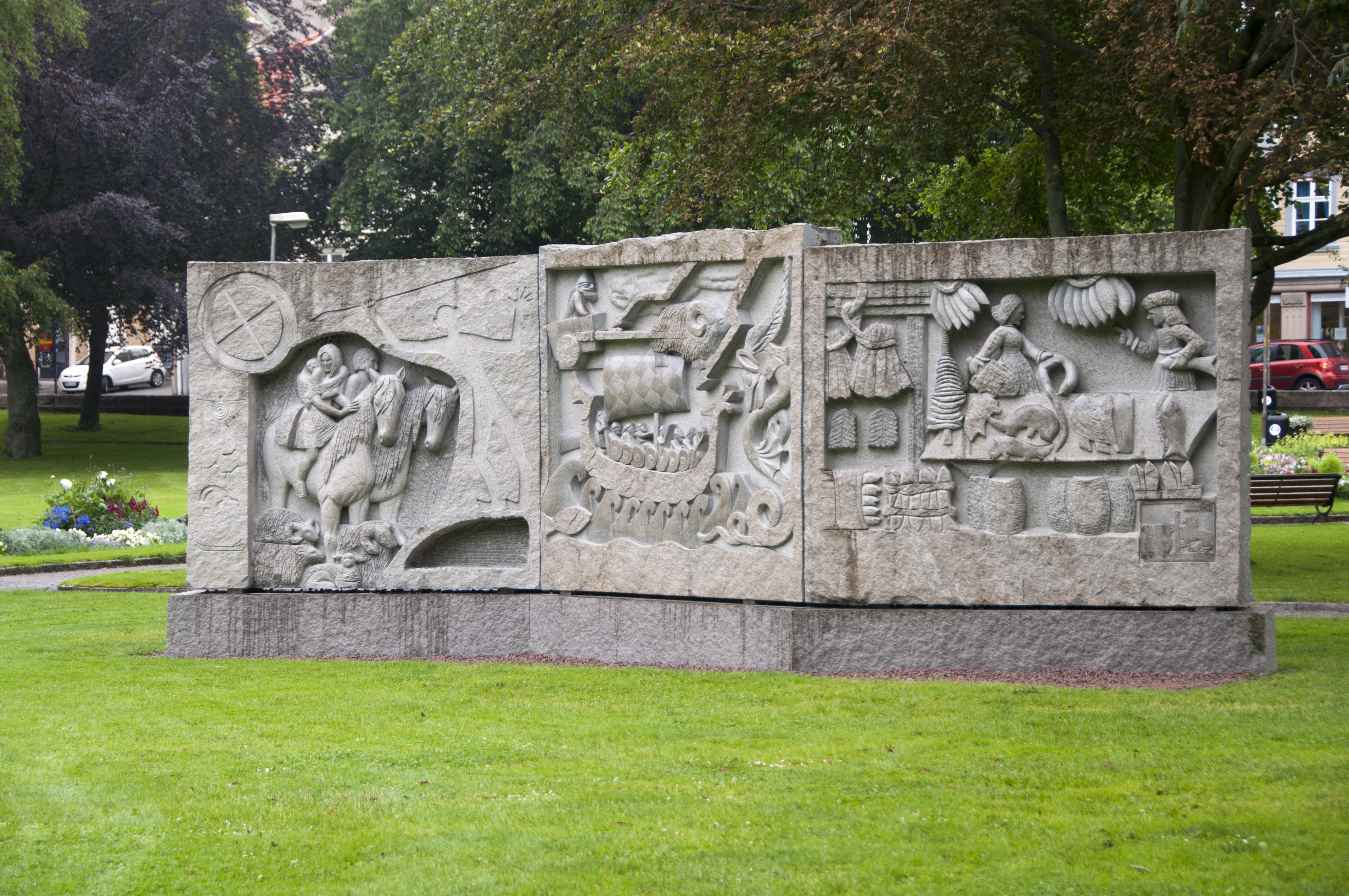 Bohuslänsk krönika i Lysekils stadspark av Ivana Machackova.Invigdes den 12/10 2013